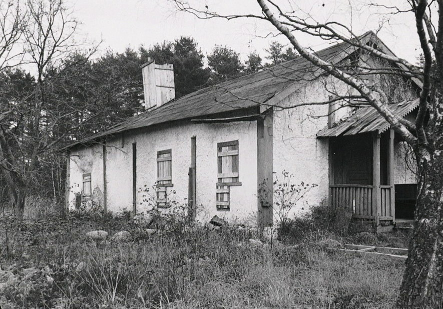 Torpet Bergholm under Farsta gård senare under Eklund